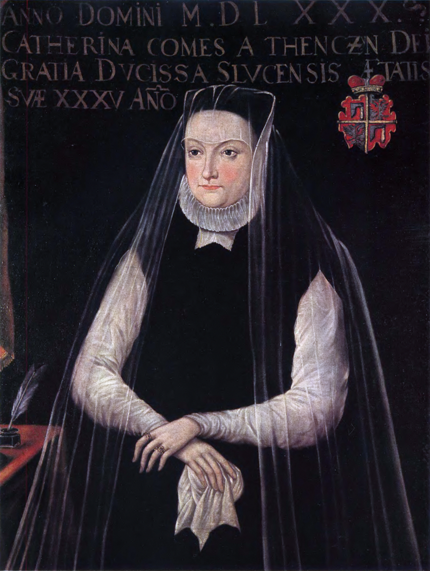 Беларуская (тарашкевіца): Партрэт Кацярыны Алелькавіч (Alelkavič) з Тэнчынскіх (Tęczyńska). Зь Нясьвіскай партрэтнай галерэі